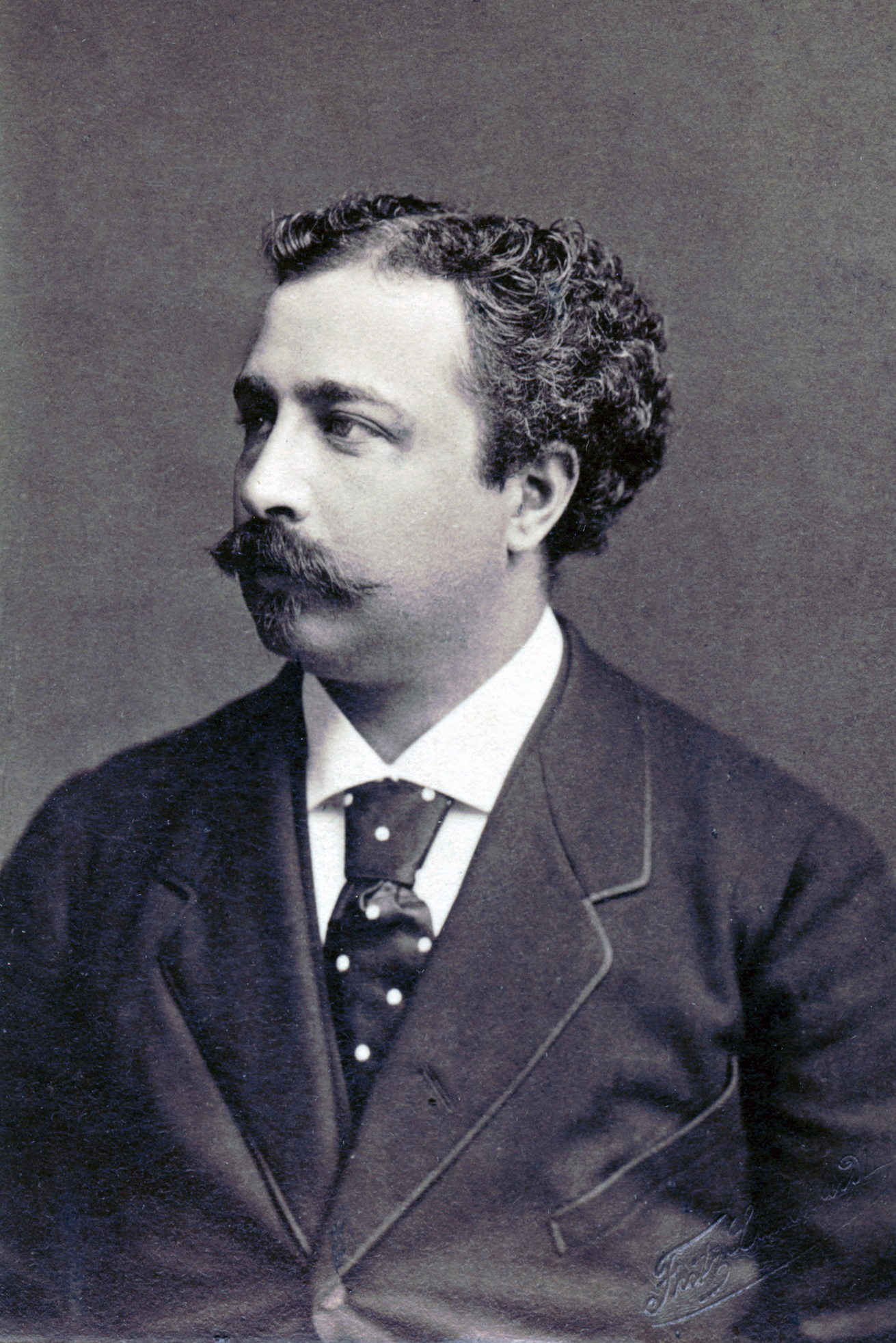 Leonard Labatt, sångare vid Kungliga Operan. Odaterat porträtt